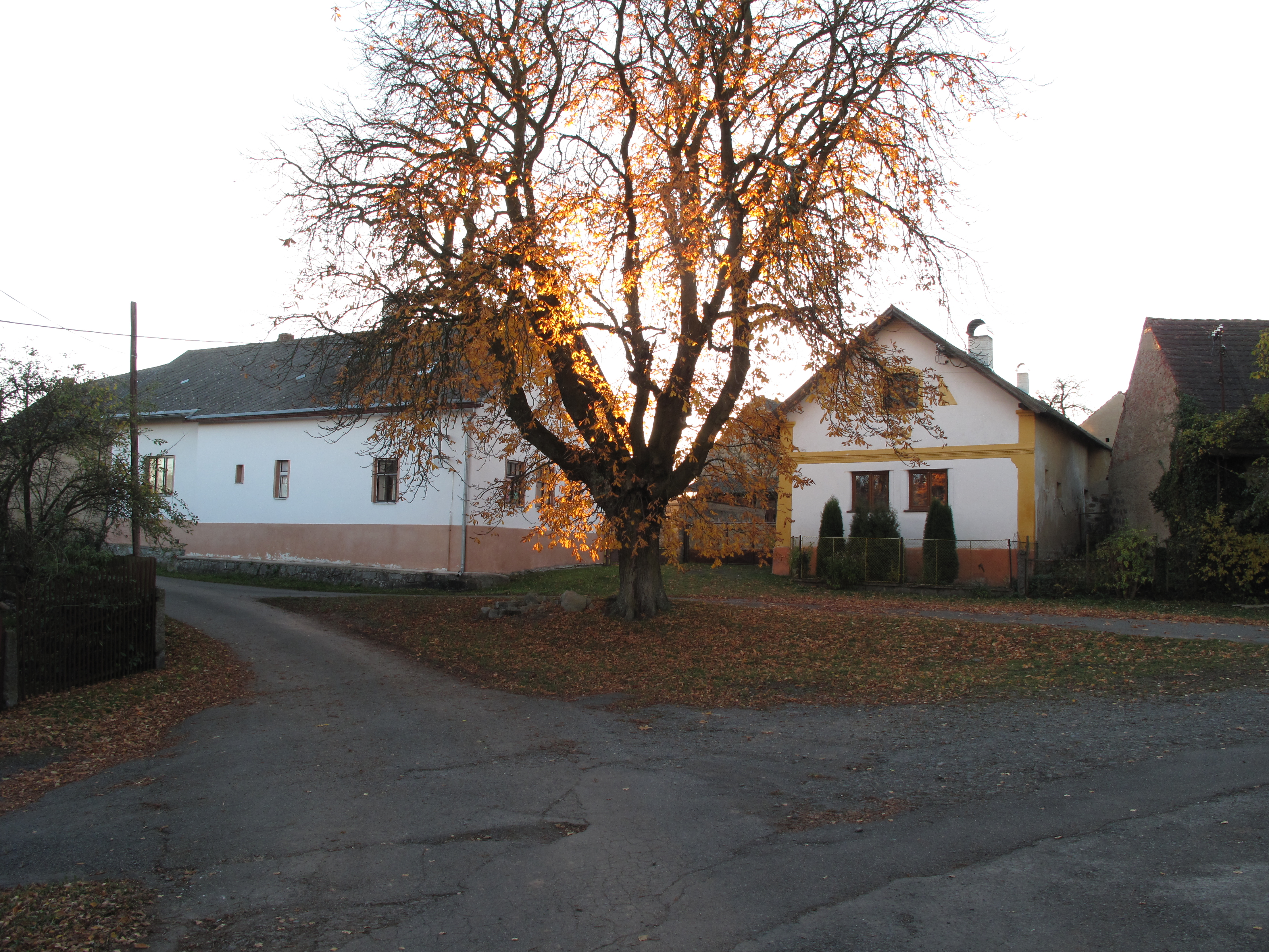 Náves v Pozdyni. Okres Příbram, Česká republika.